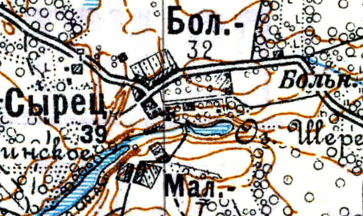 Топографическая карта Ленинградской области, квадрат Vc-29 (Батецкая), деревня Сырец